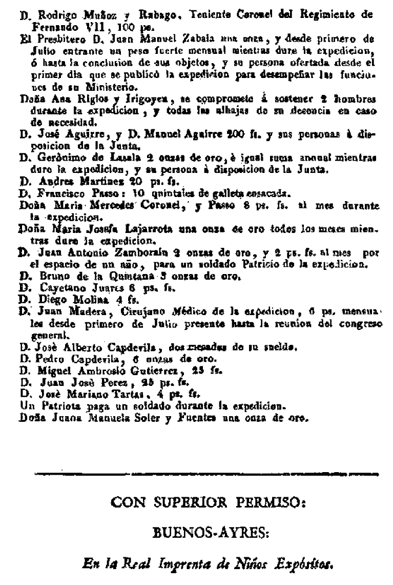 Listado de suscriptores al fondo para la Expedición Auxiliadora